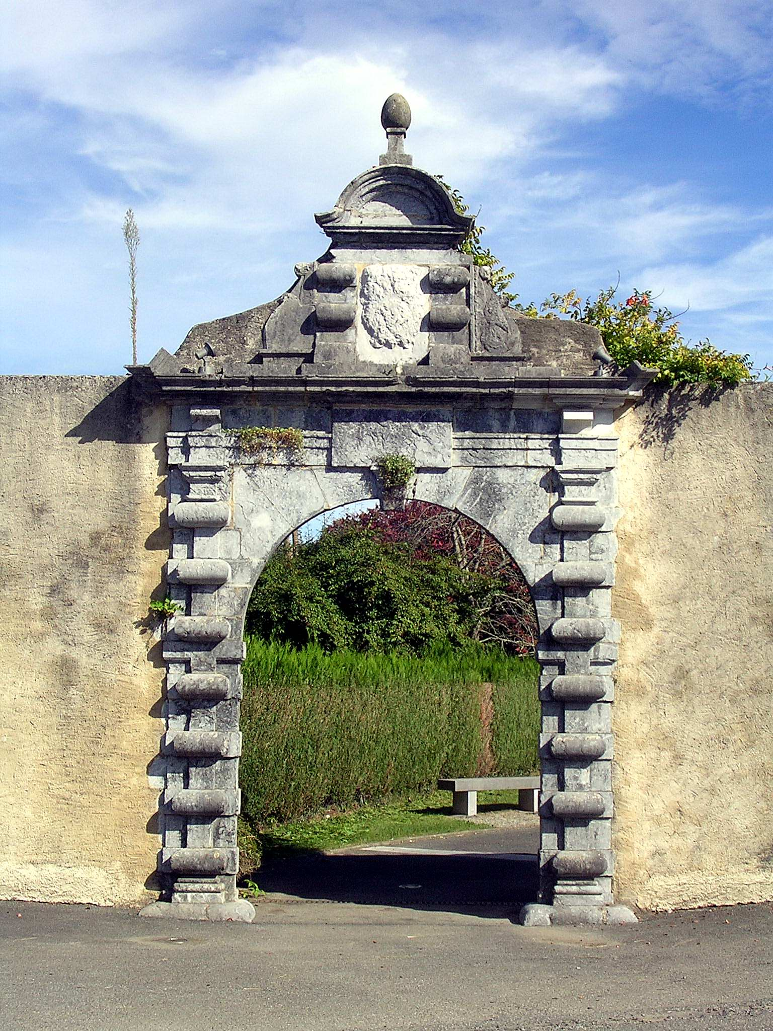 Porte de m'ancienne abbaye laïque d'Aramits, dans le département français des Pyrénées-Atlantiques